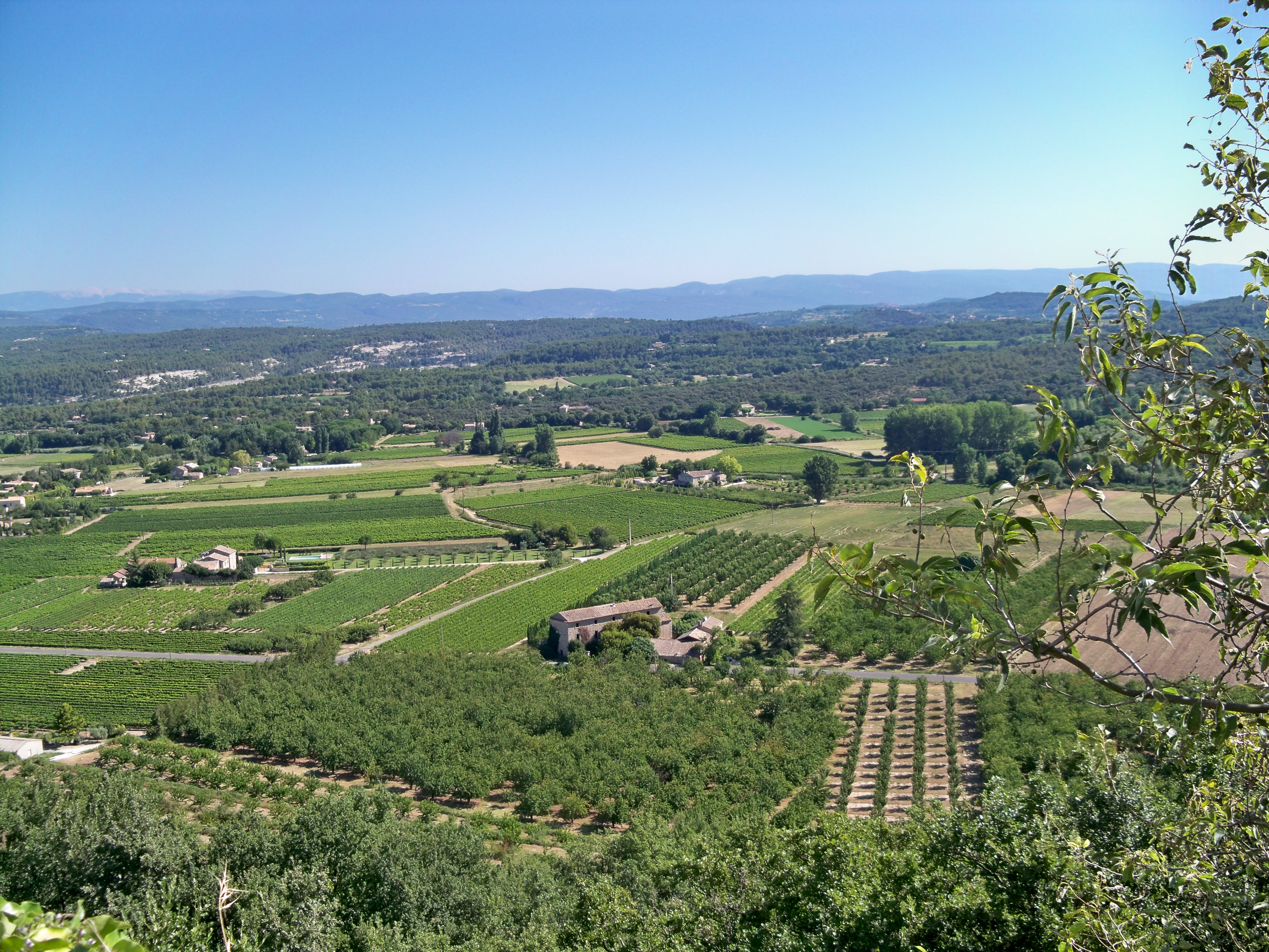 Plaine du Luberon vue de Ménerbes, Vaucluse, France